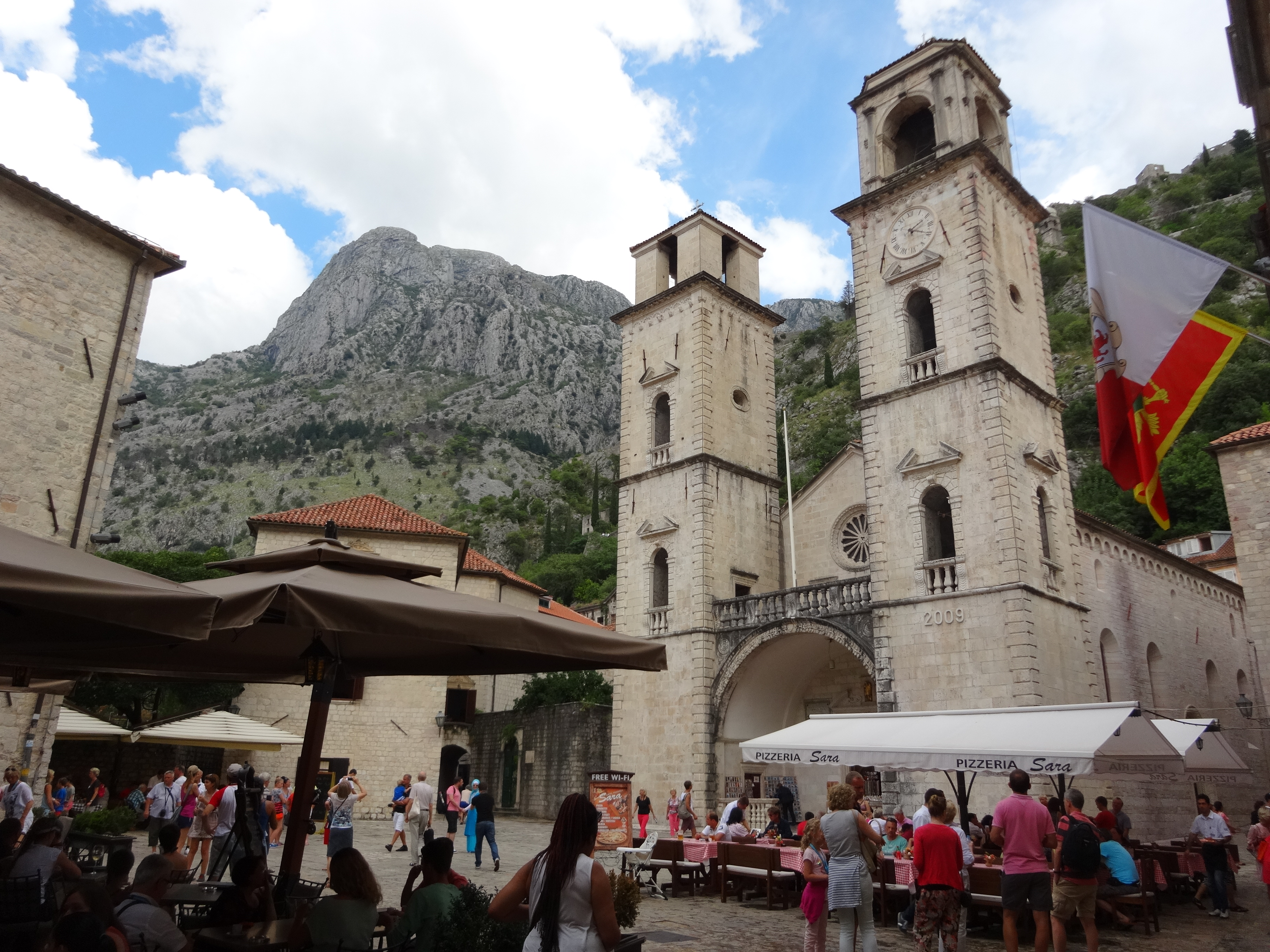 Alter Marktplatz in Kotor mit Gebirge im Hintergrund